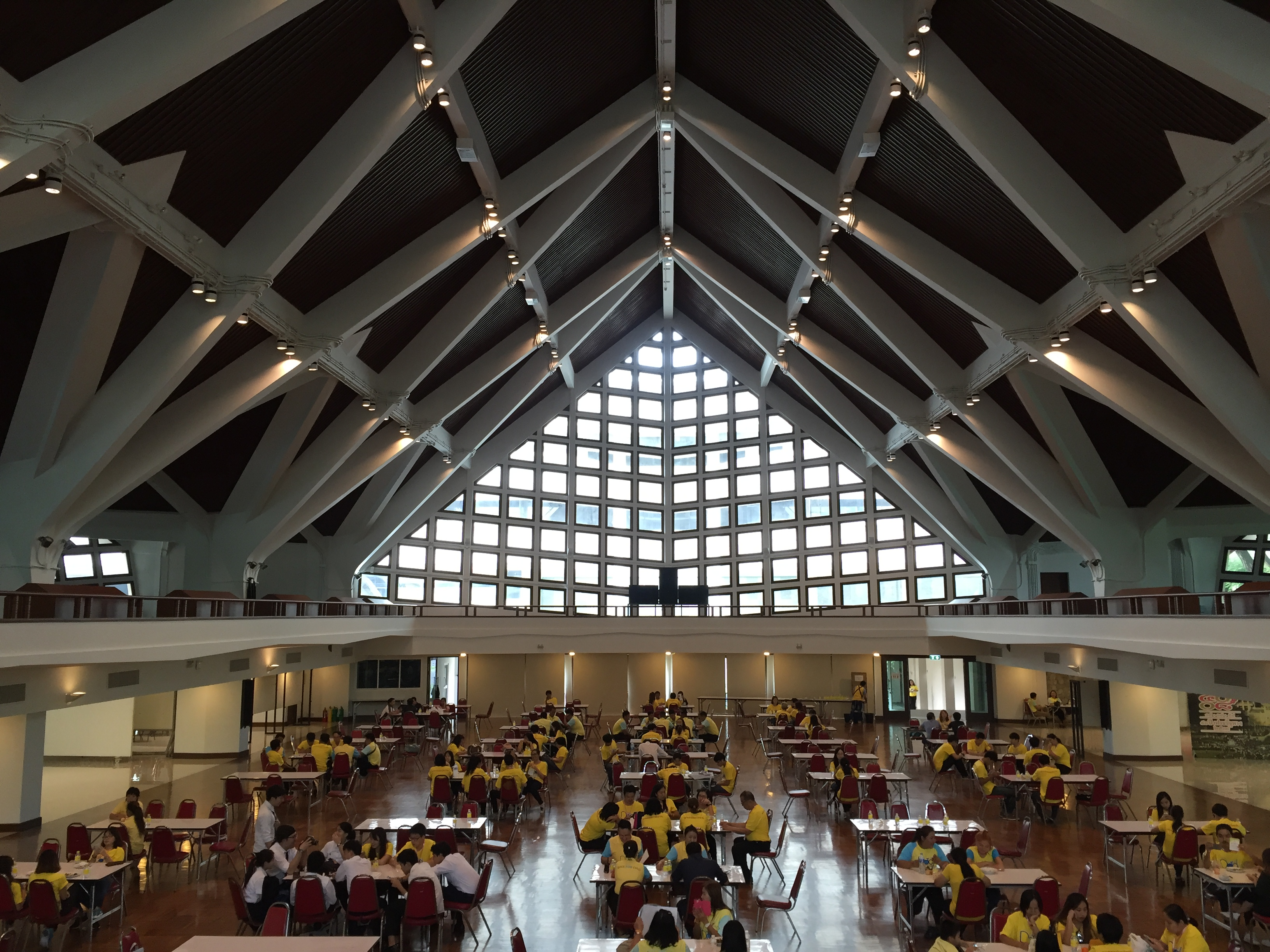 พื้นที่ว่างด้านล่างปูพื้นด้วยไม้ กว้างขวางเพียงพอที่ใช้จัดงานสำคัญ อาทิ การลงทะเบียนแรกเข้าของนิสิตชั้นปีที่ 1